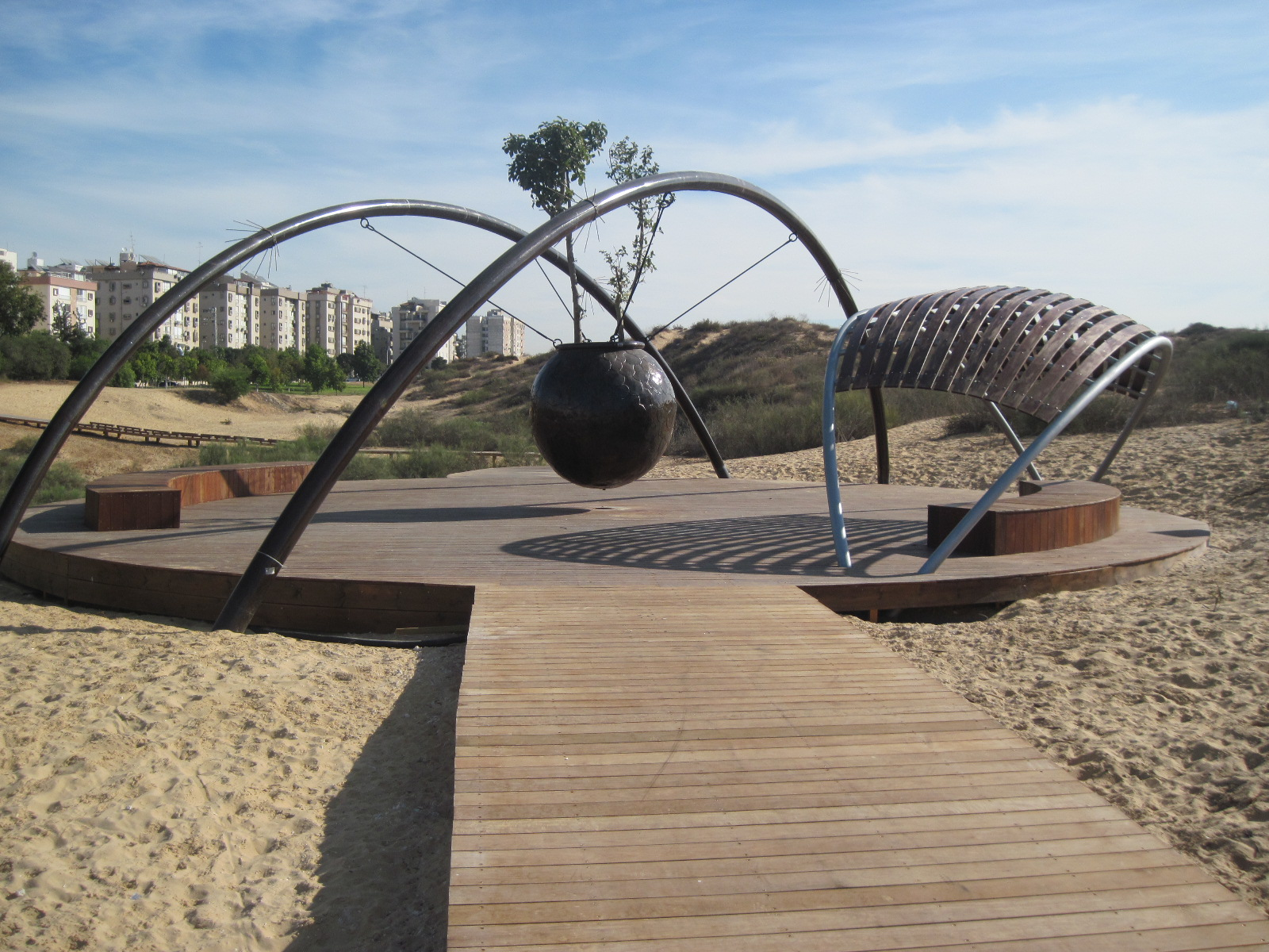 עבודת ברזל בנפחים. פסל: מיצג עץ השקמה ישראל פרימו 700/350 ס"מ